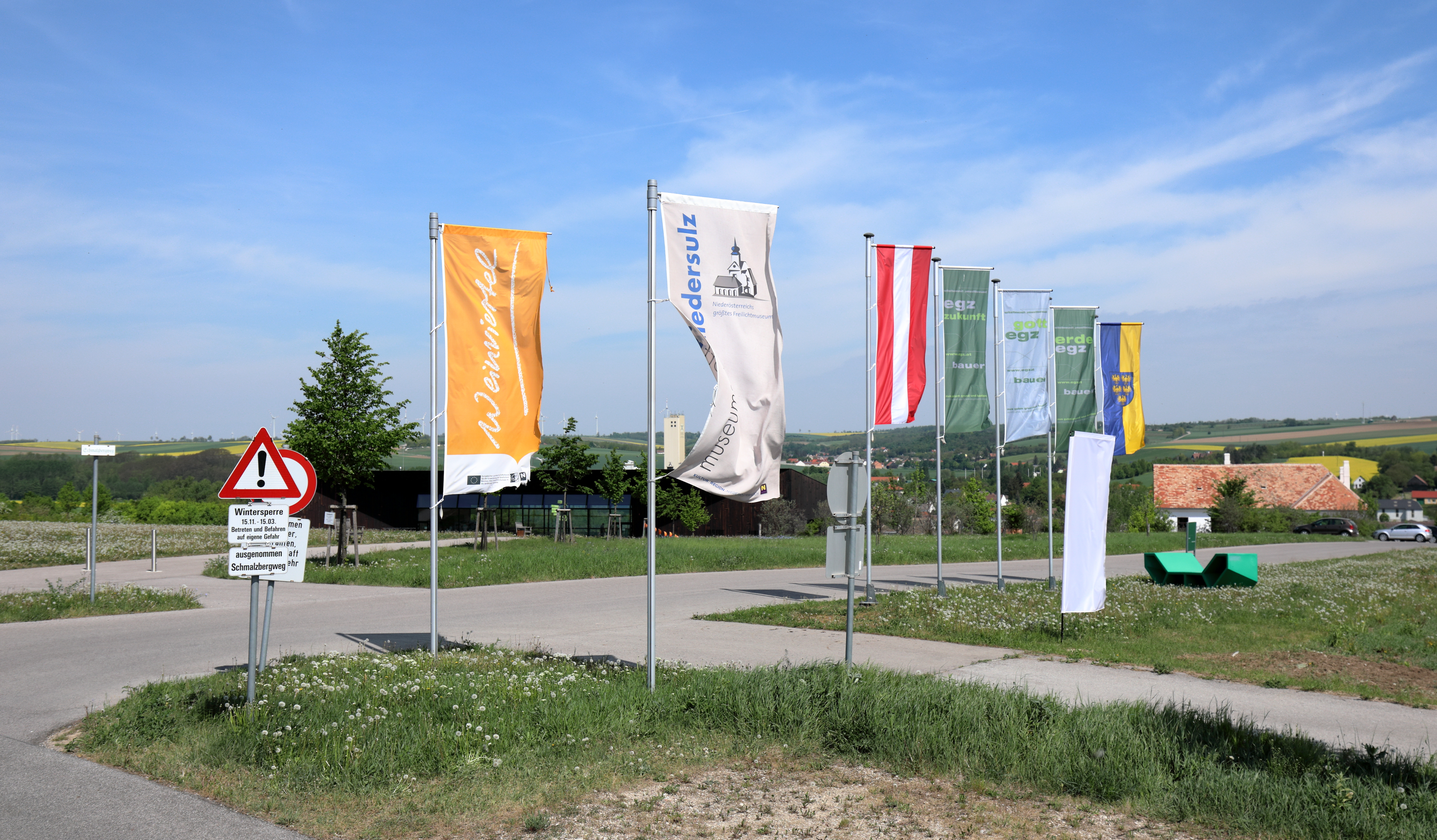 Zugangsbereich zwischen Parkplatz und Besucherzentrum bzw. MuseumsPortal des Museumsdorfes Niedersulz in der niederösterreichischen Marktgemeinde Sulz im Weinviertel. Anfang der 2010er Jahre wurde das größte Freilichtmuseum Niederösterreichs umgebaut und erweitert. Dabei wurde unter anderem der Eingangsbereich verlegt, ein Besucherzentrum bzw. MuseumsPortal errichtet, ein neuer Parkplatz gebaut und am 16. Mai 2012 eröffnet.